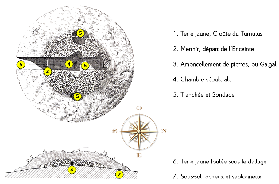 Plan Tumulus Saint Fiacre